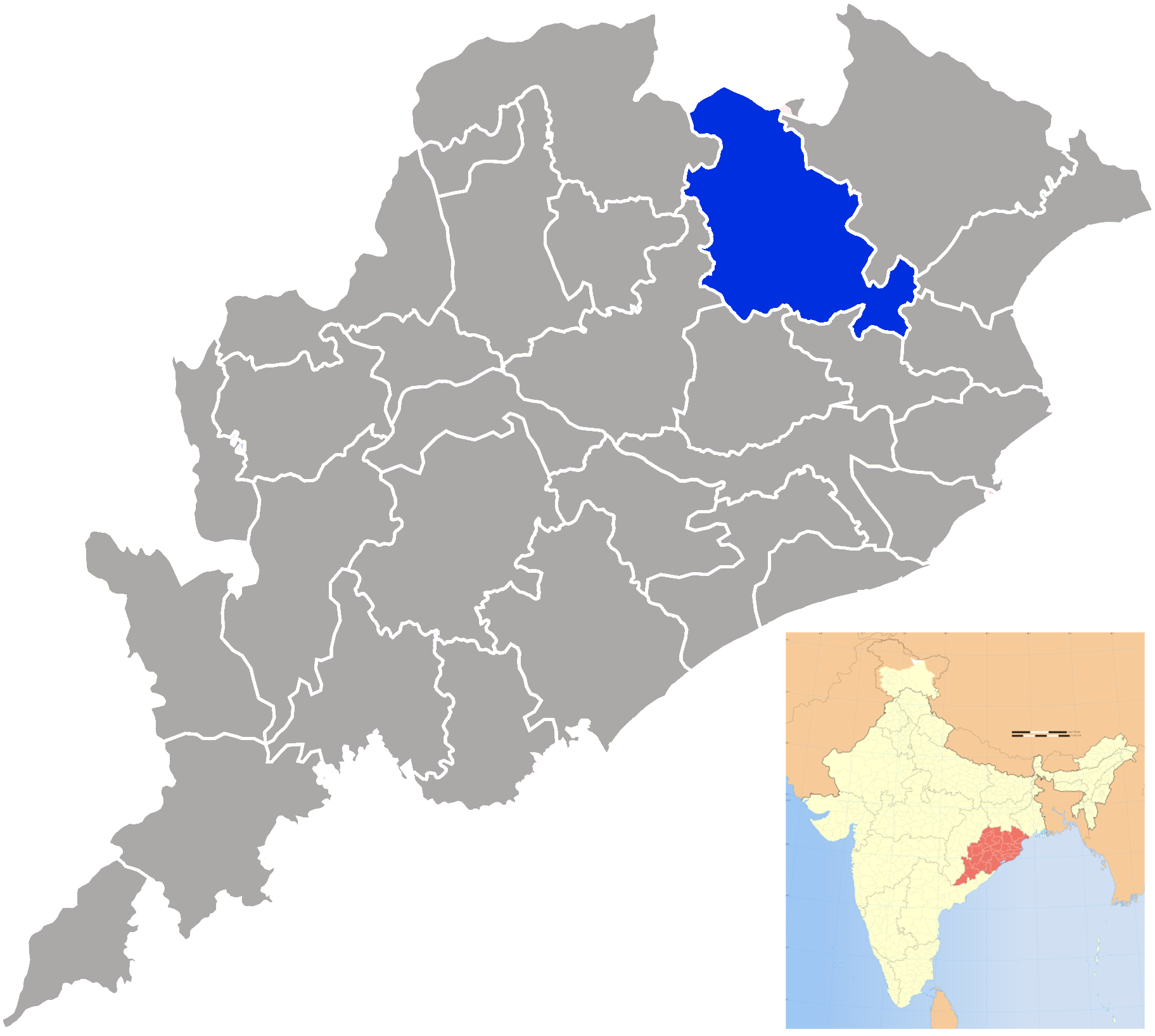 Distrito de Kendujhar en Orissa